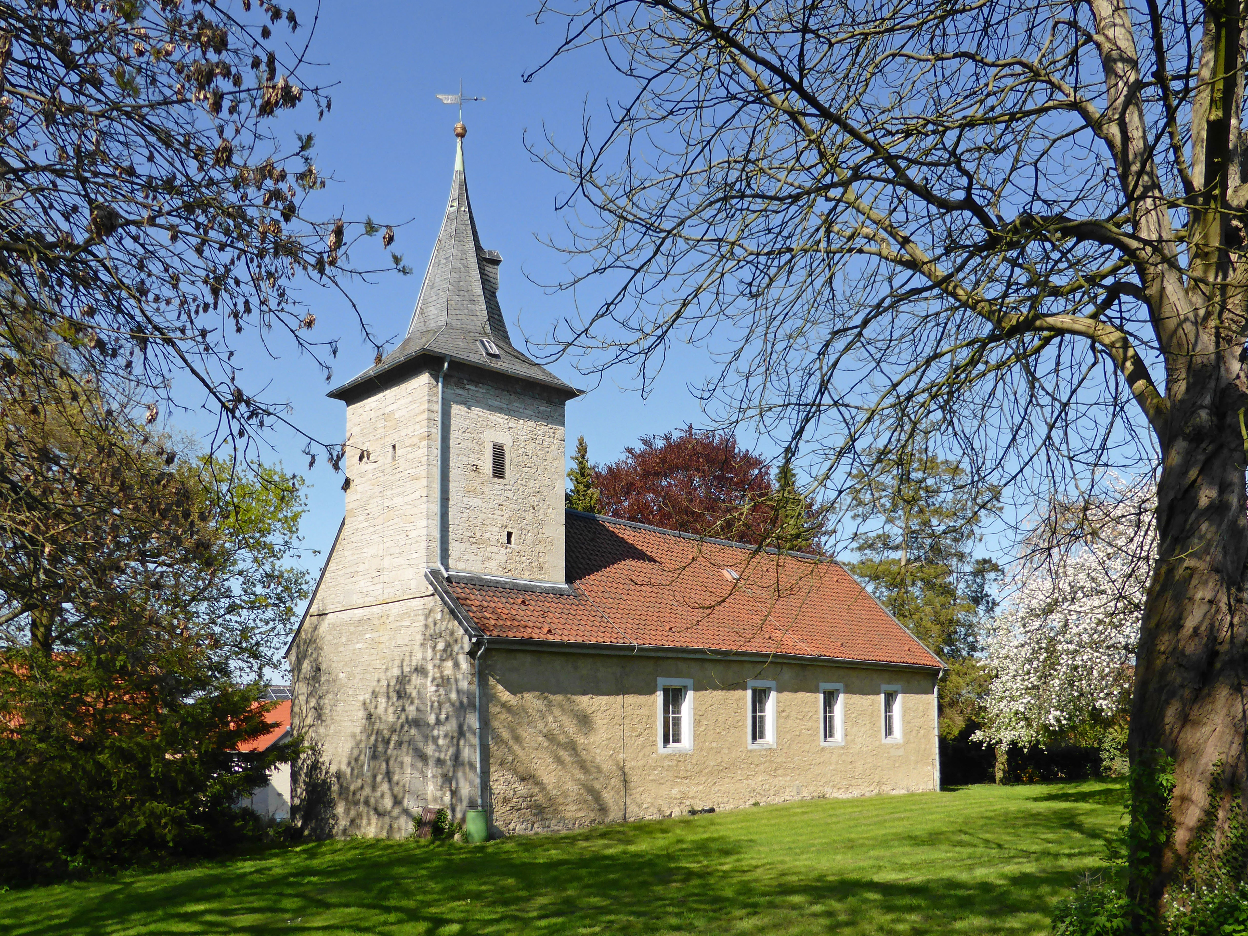 Evangelische Kirche in Wolsdorf, Landkreis Helmstedt.